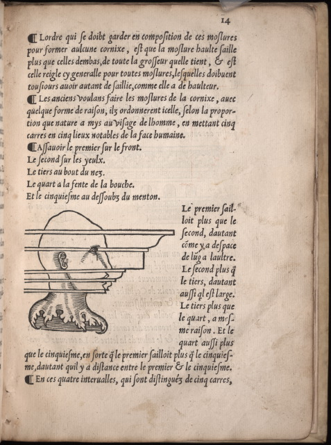 Diego de Sagredo: Raison d'architecture antique. Simon des Colines: Paris, 1542.